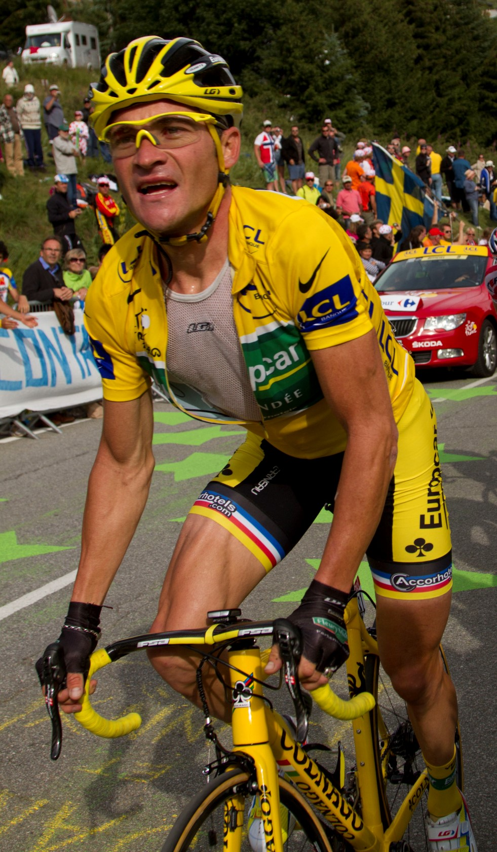 alpedhuez 102 voeckler